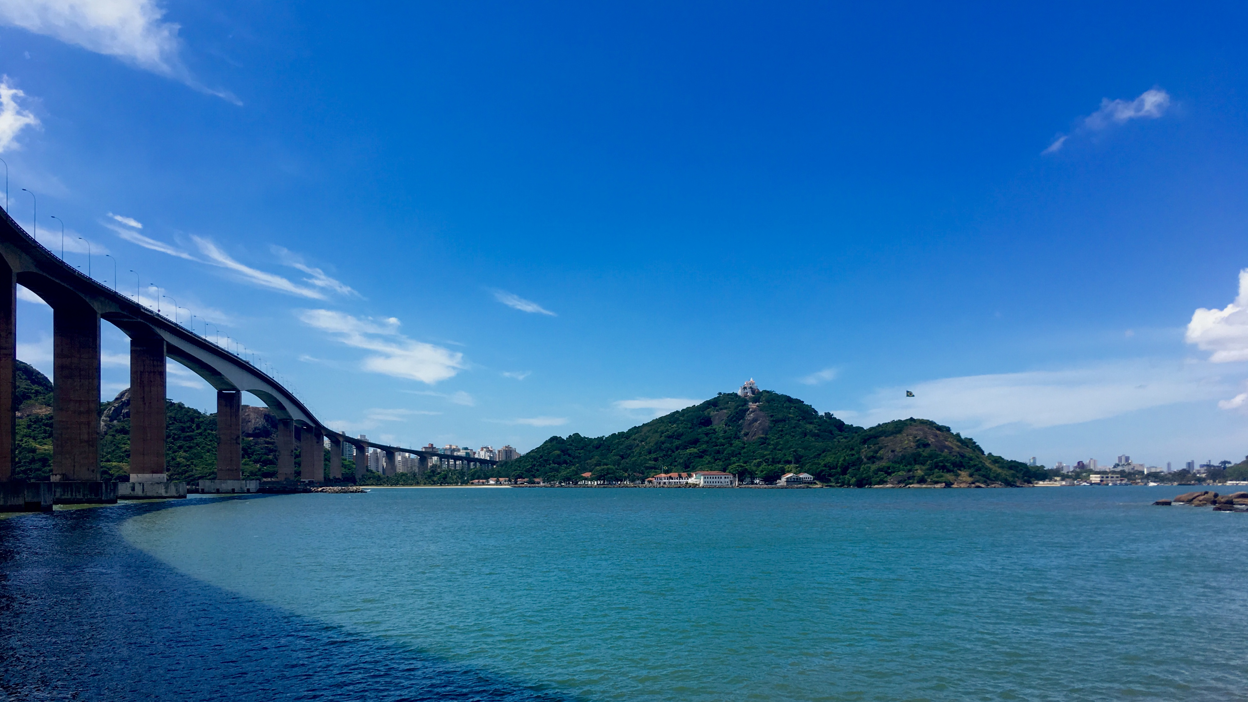 Vista para o Convento da Penha, um importante ponto turístico cuja observação foi prejudicada por causa da estrutura de concreto.